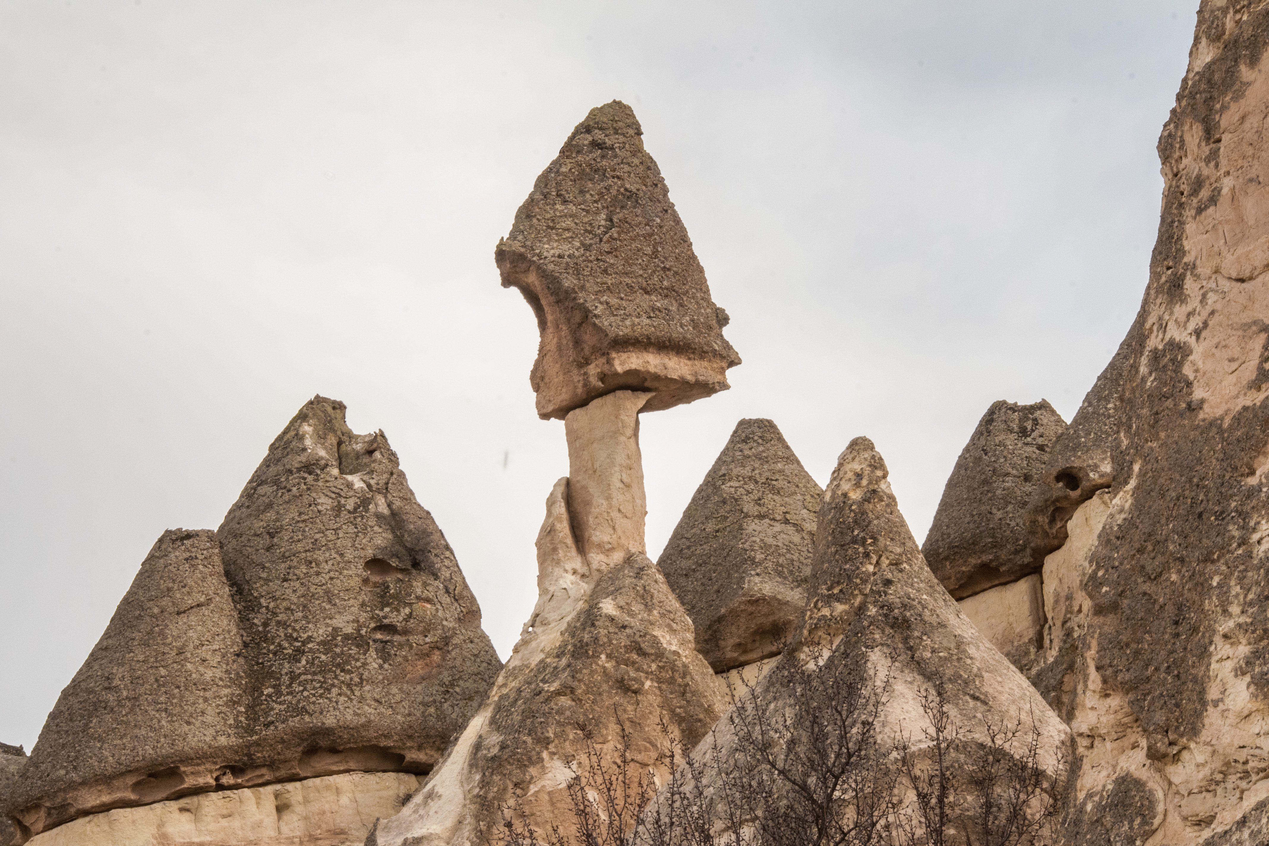 Between Cavusin and Avanos